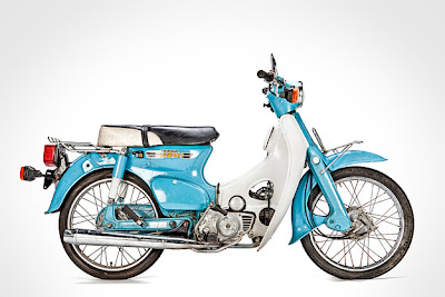 ฮอนด้า ซี 70